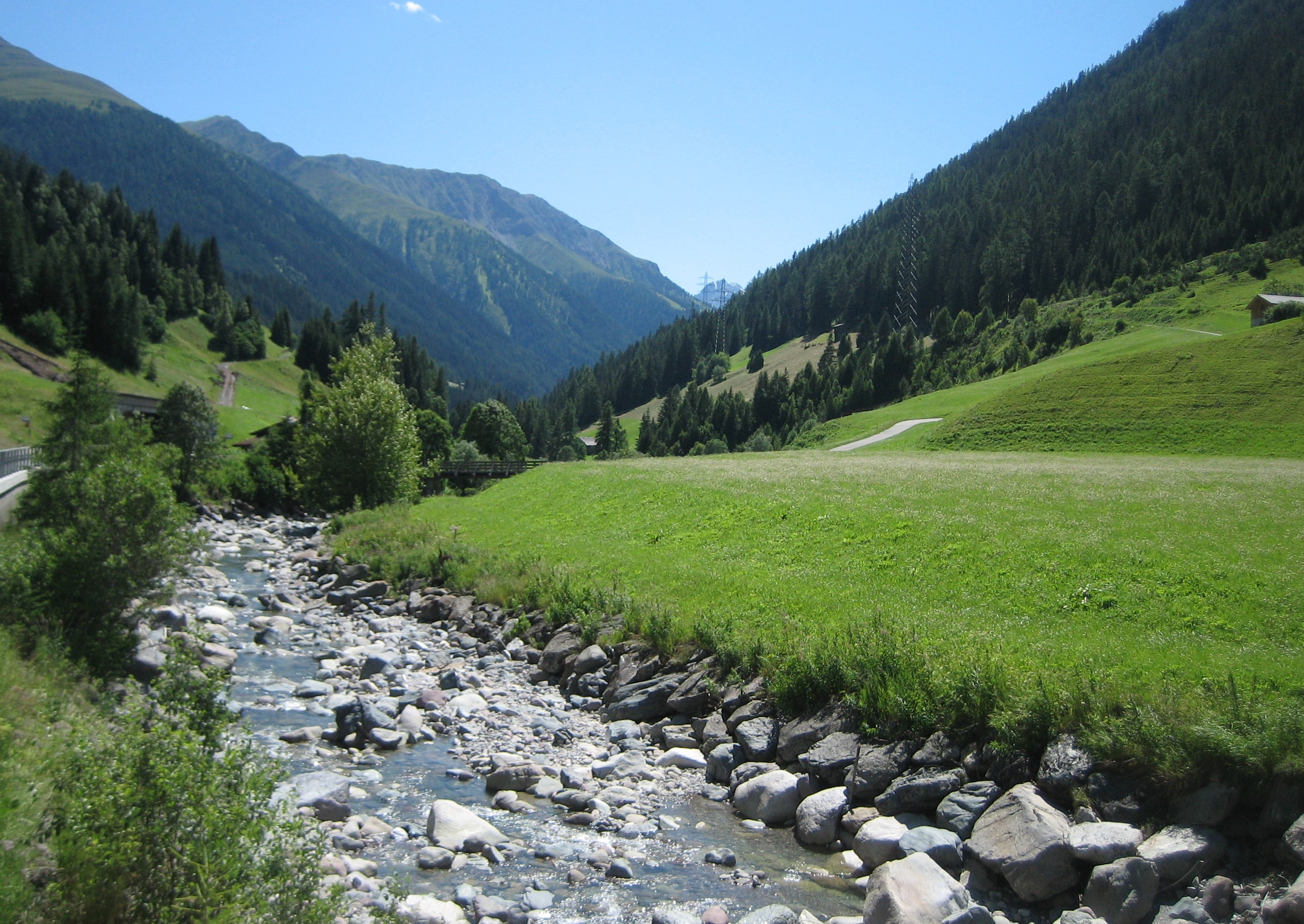 Landwassertal Richtung SW